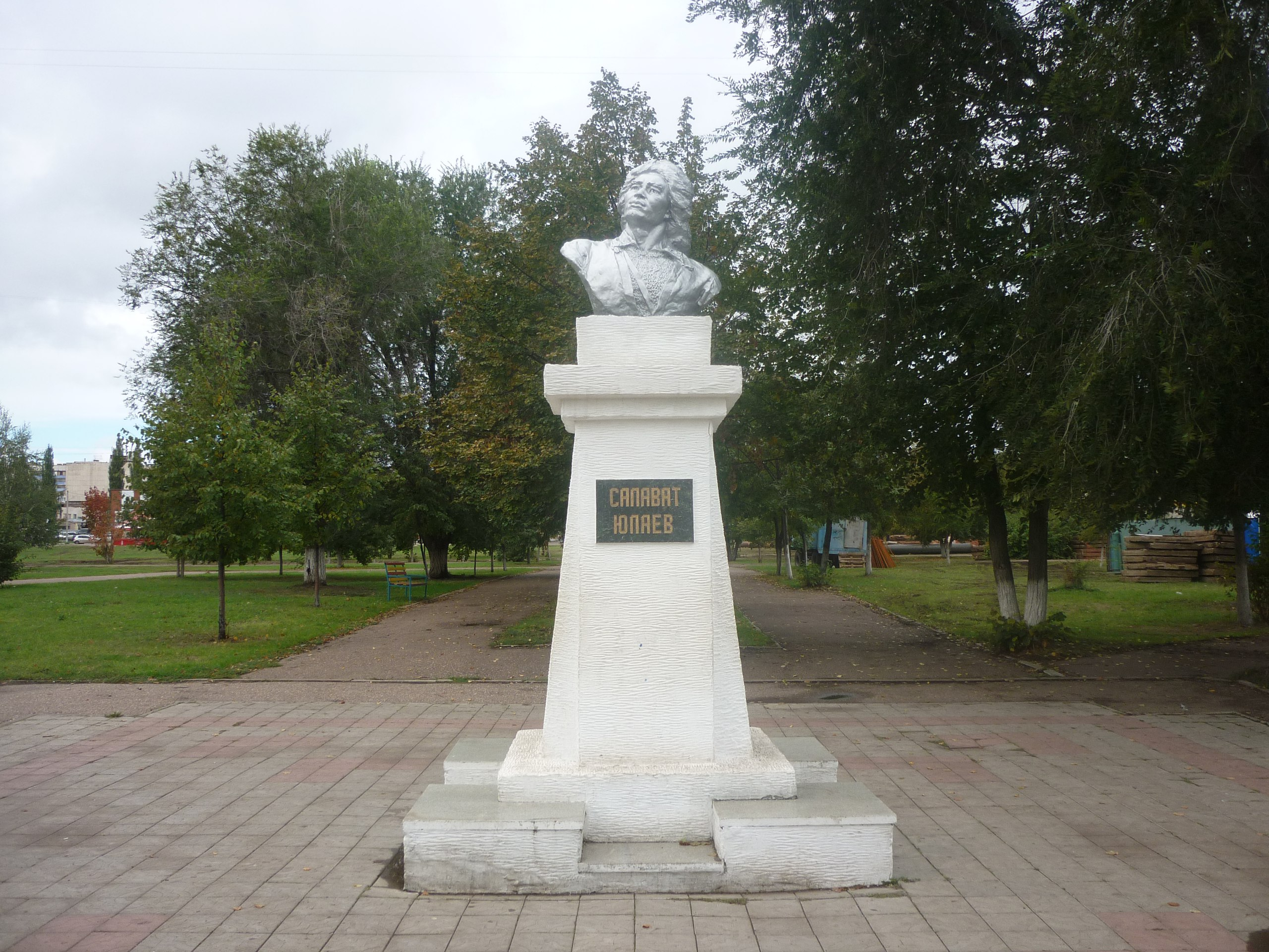 Памятник Салавату Юлаеву: бульвар Салавата Юлаева, Салават, Башкортостан